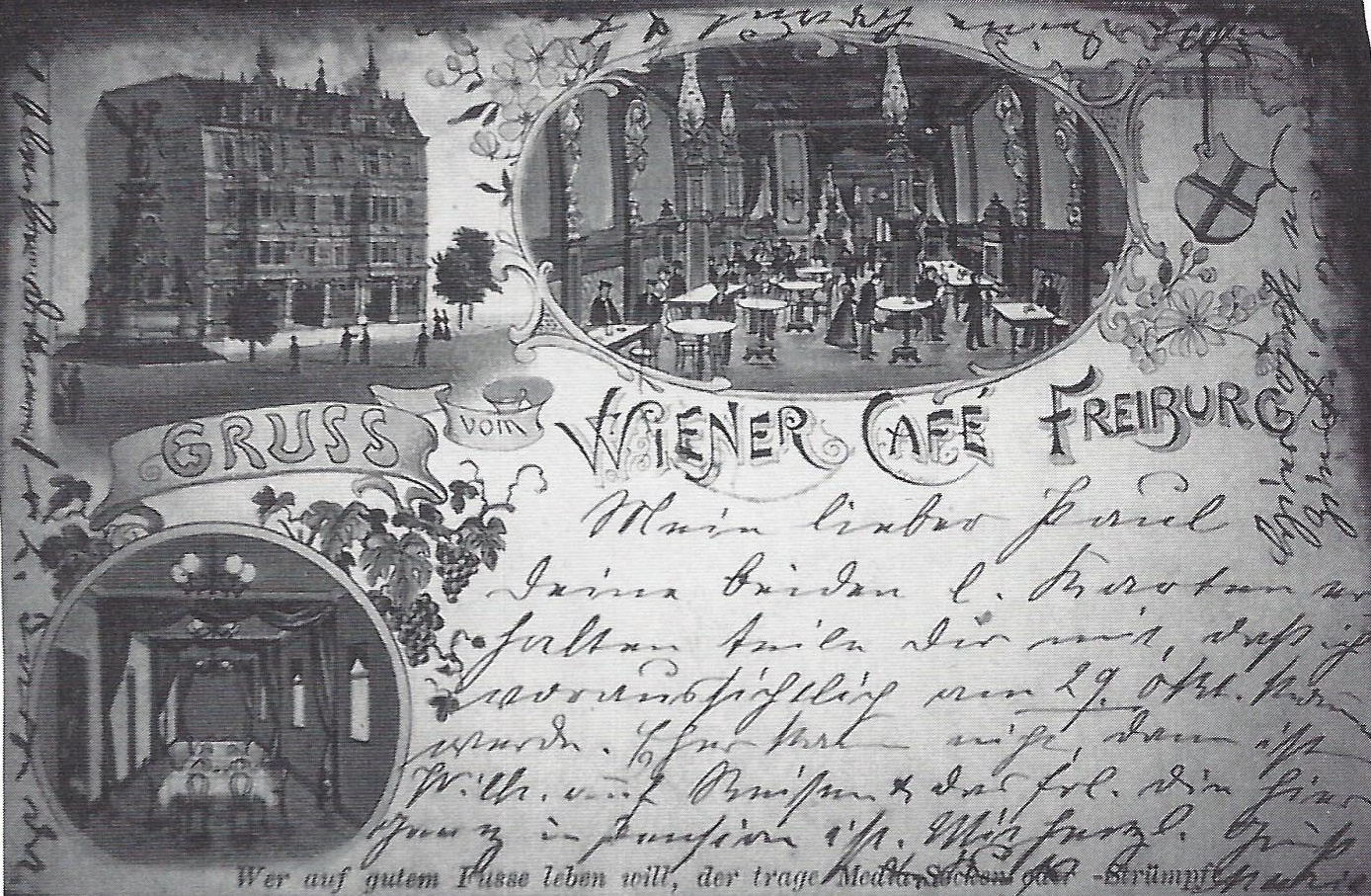 Postkarte des Wiener Cafés in Freiburg im Breisgau